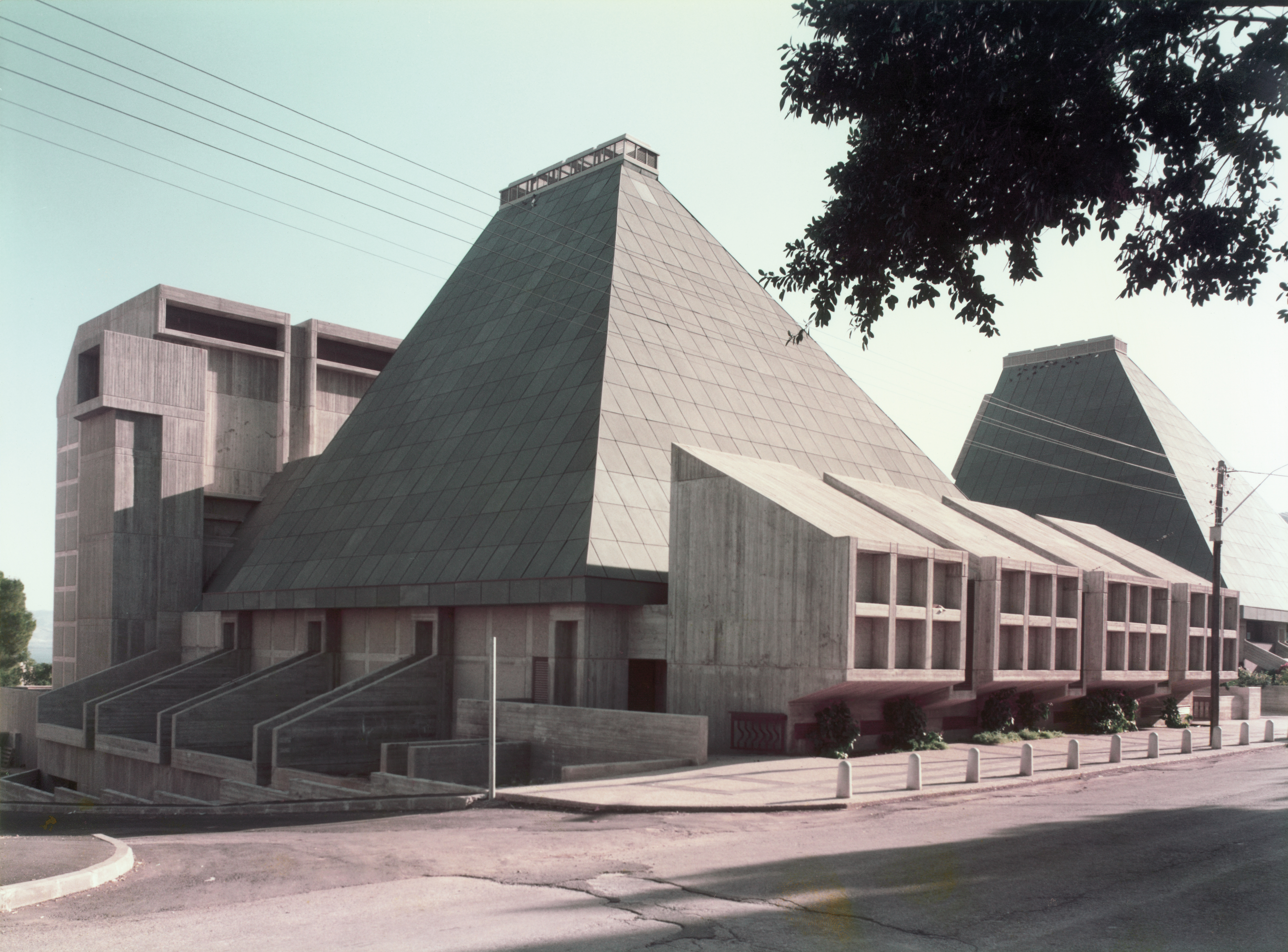 מרכז תרבות "יד שטרית", טבריה